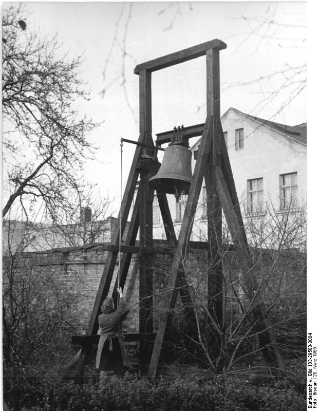 Zentralbild-Biscan Wjt-Qu 7 Mot. 25.3.1955 Nur die Glocke blieb unversehrt Im Februar 1945 zerstörte ein englich-amerikanischer Terrorangriff die St. Stephanus-Kirche in Magdeburg-Westerhüsen. Das Kirchenschiff wurde völlig, der Turm schwer beschädigt. Für die Rüstung hatten die Nazis die Kirchenglocke beschlagnahmt. Sowjetische Verwaltungsstellen gaben der Kirchengemeinde nach Kriegsende die Glocke zurück. Auf einem behelfsmäßigen Glockenstuhl wurde diese Glocke, die aus dem Jahre 1523 stammt, aufgehängt.